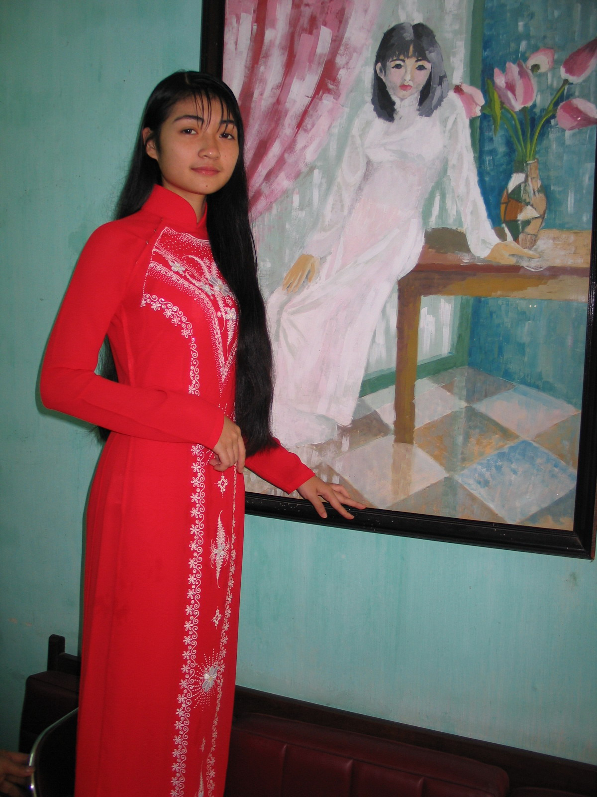 Wedding Ao dai (Áo dài cưới)